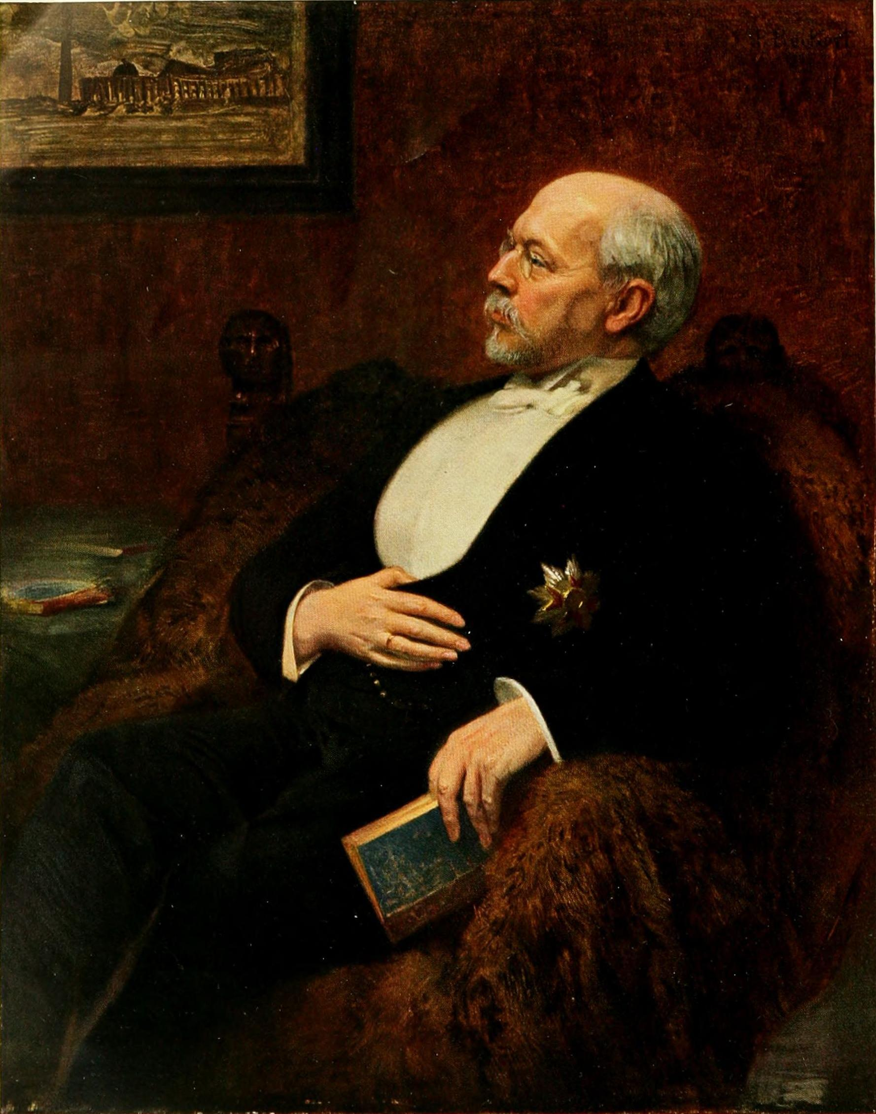 Georg von Hertling, Bayerischer Ministerpräsident, Preußischer Ministerpräsident, Deutscher Reichskanzler